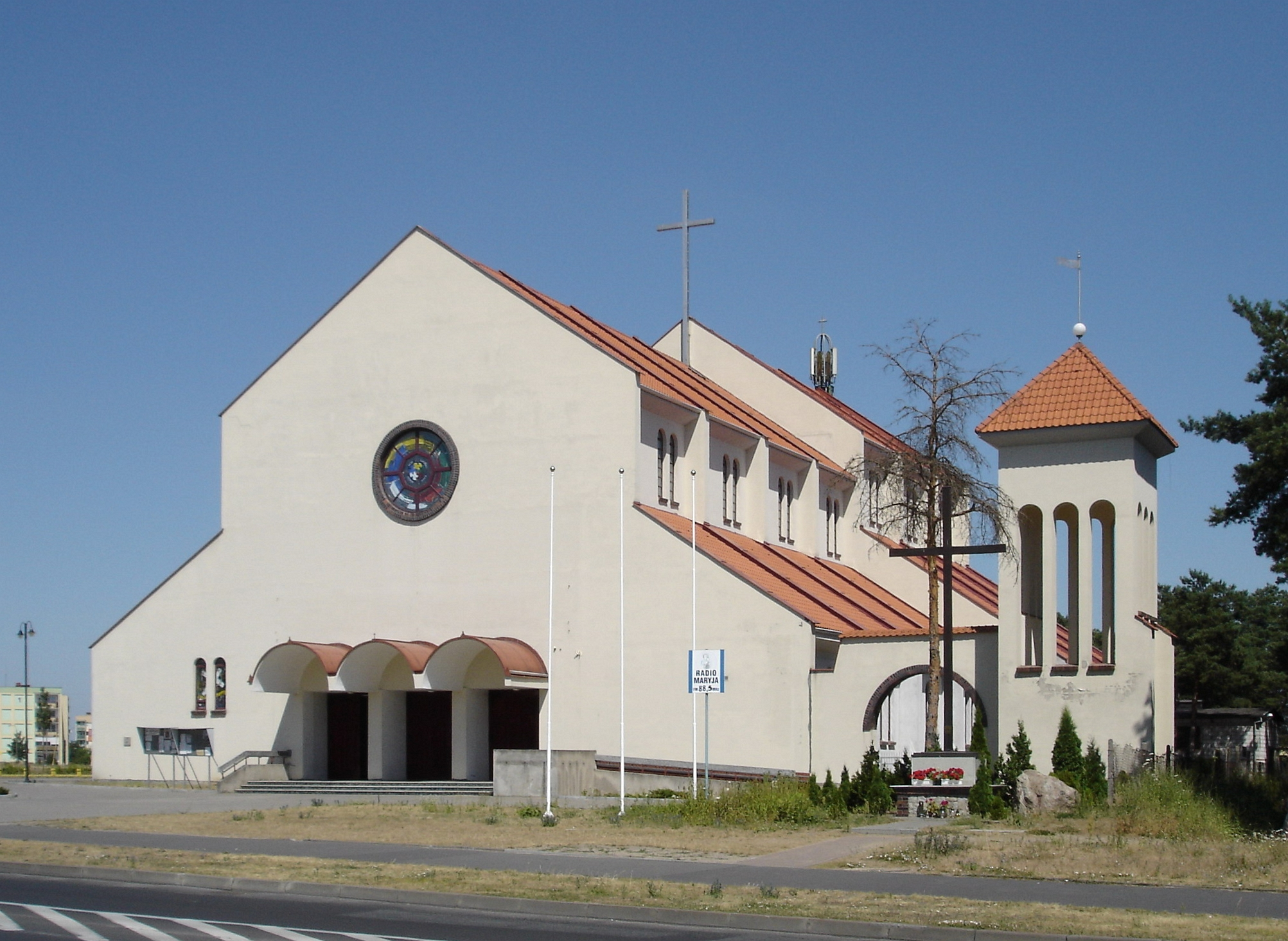 Kościół św. Mateusza w Bydgoszczy.